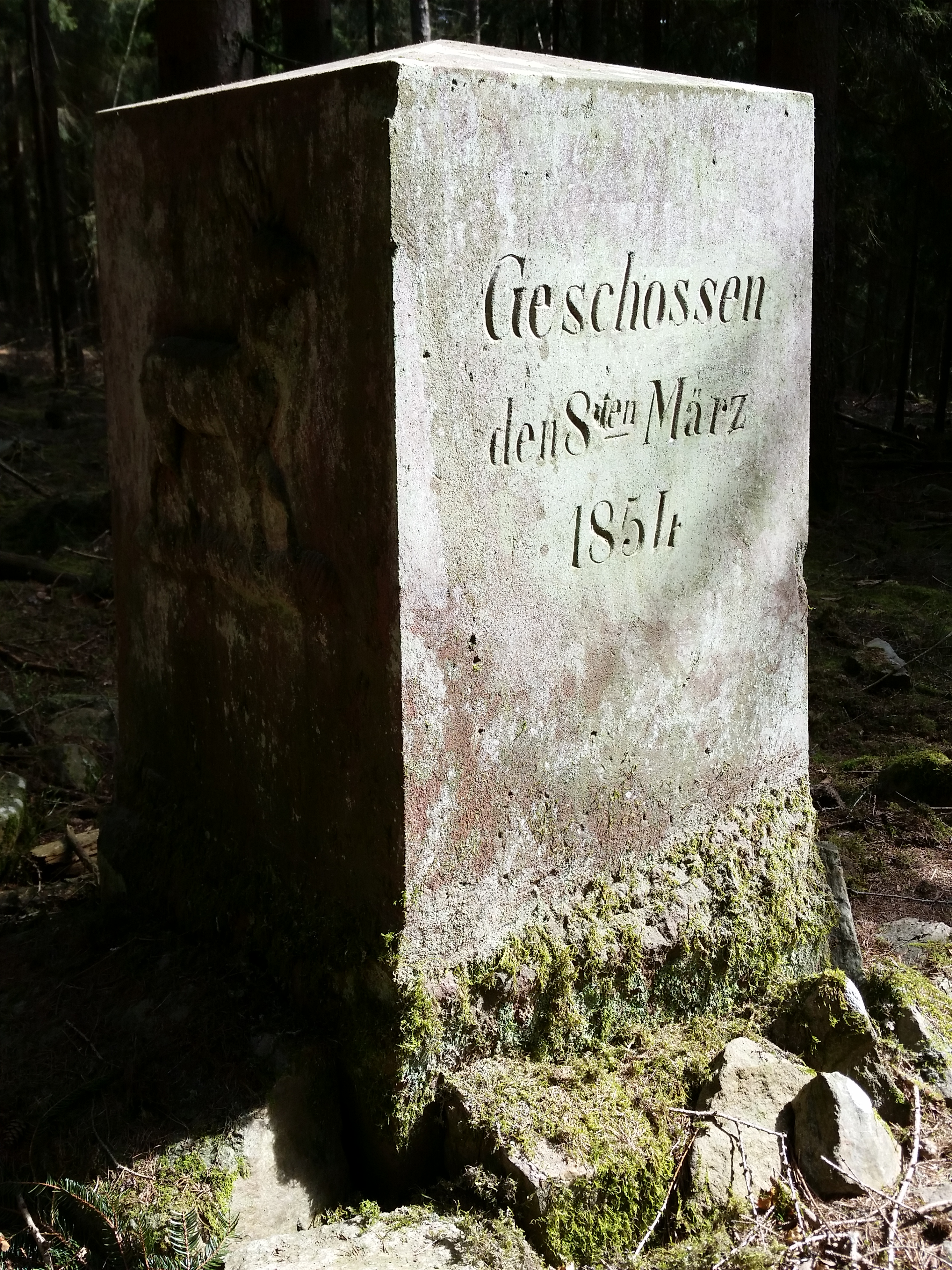 Zum Andenken an seinen Jagdschuss am 8.3.1854 ließ Landgraf Ferdinand zwei Hirschsteine aufstellen.